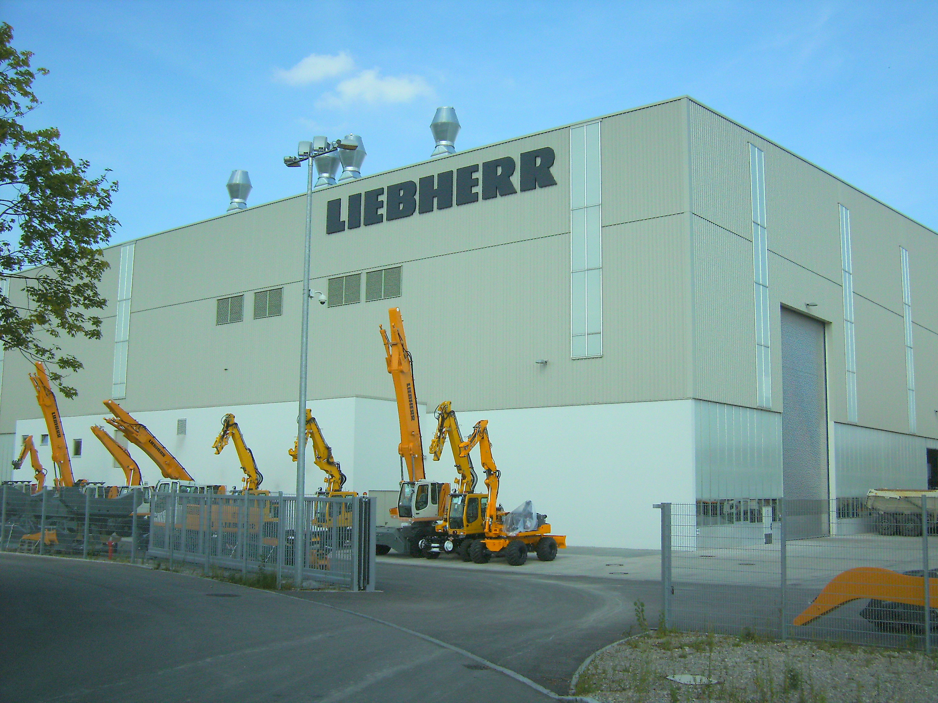 Neue Halle der Firma Liebherr in Kirchdorf an der Iller, Baden-Württemberg, Deutschland